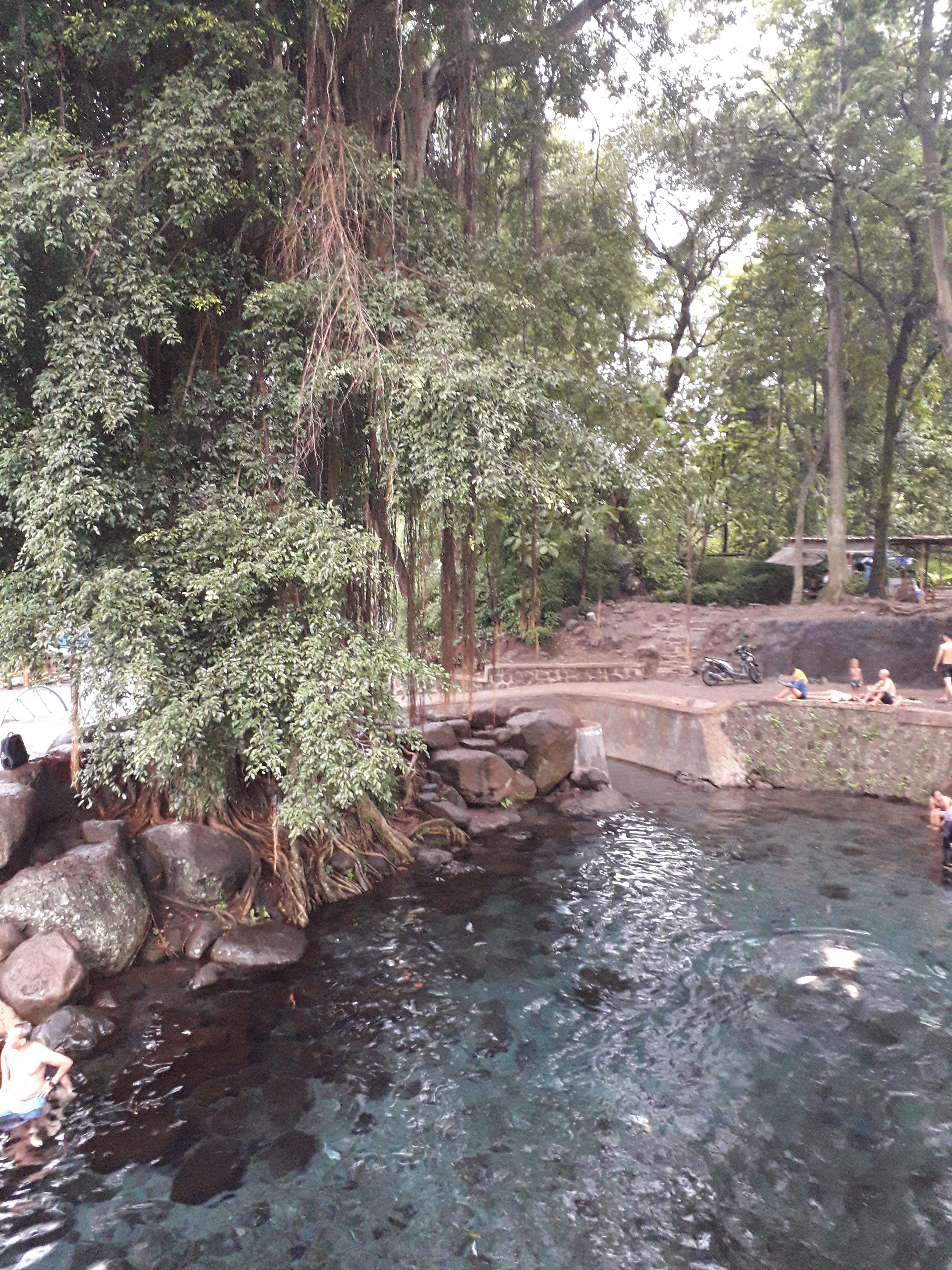 Basa Jawa: Umbul Sigedang yaiku sawijining Umbul utawa panggon padusan ana ing Kabupaten Klaten